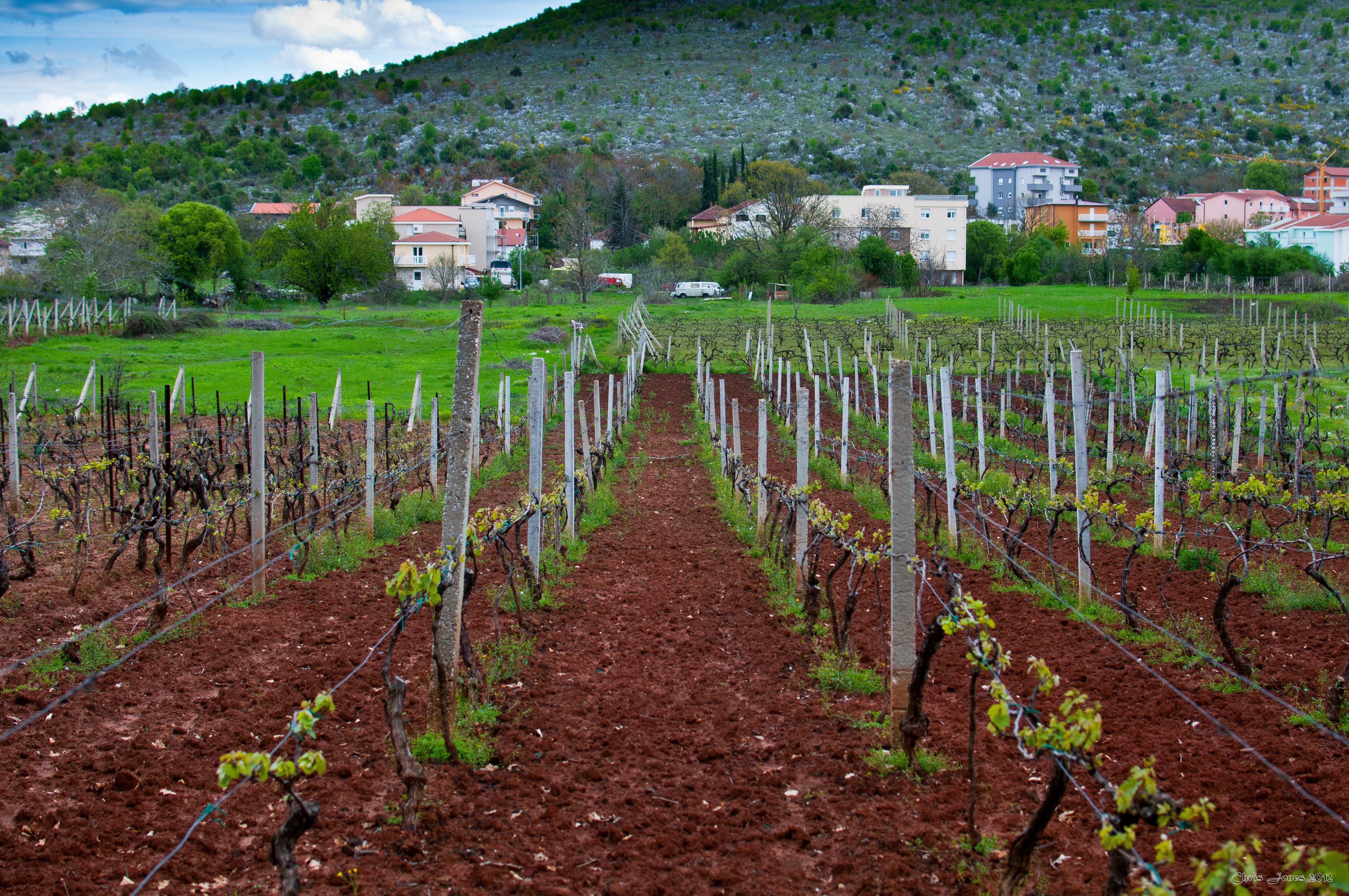 Međugorje